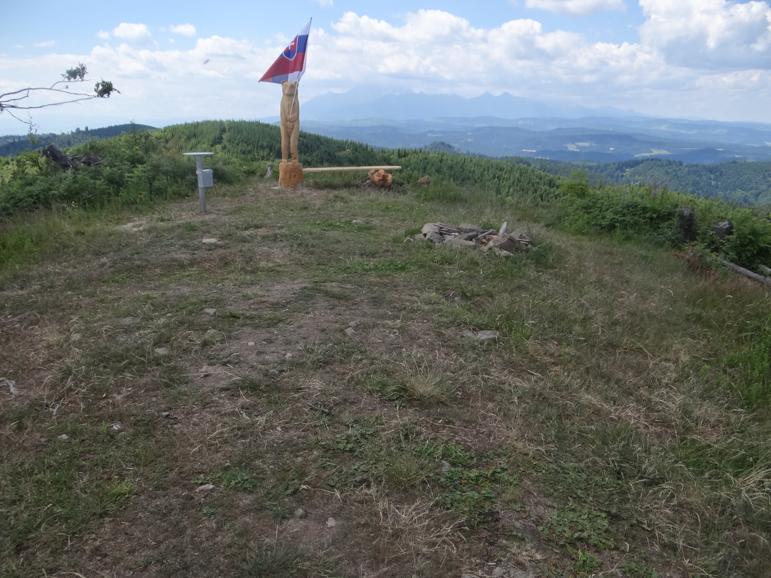 Veterný vrch